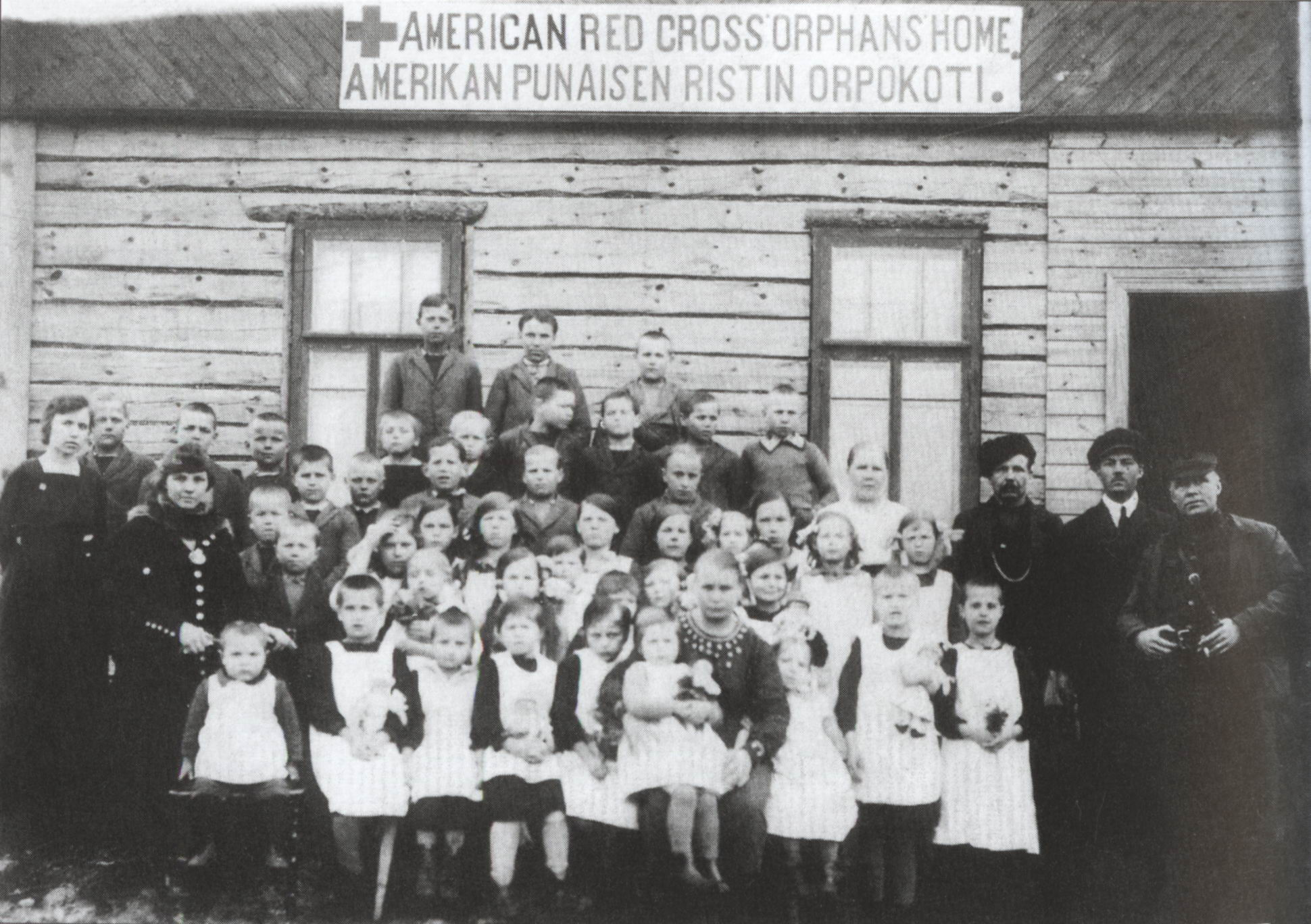 Воспитанники ингерманландского детского дома в Рауту (Сосново), 1920 г. Содержался на средства американского Красного Креста до 1947 г.